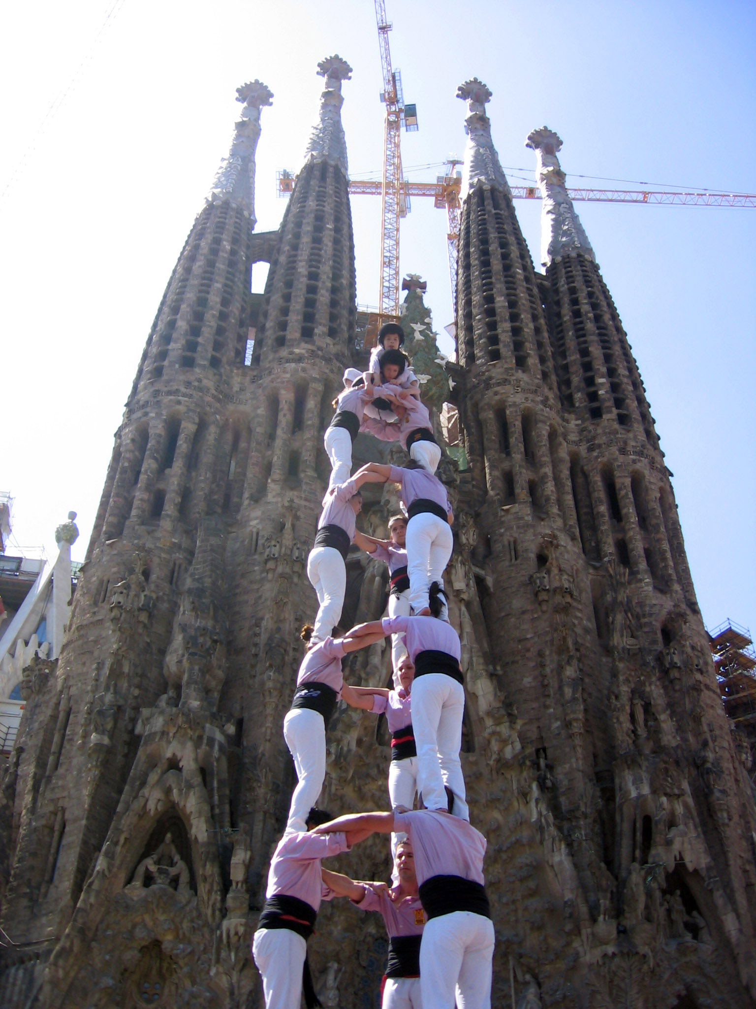 Primer 3 de 8 dels Minyons de Terrassa fet a la temporada 2013, descarregat a la Festa Major de la Sagrada Família.